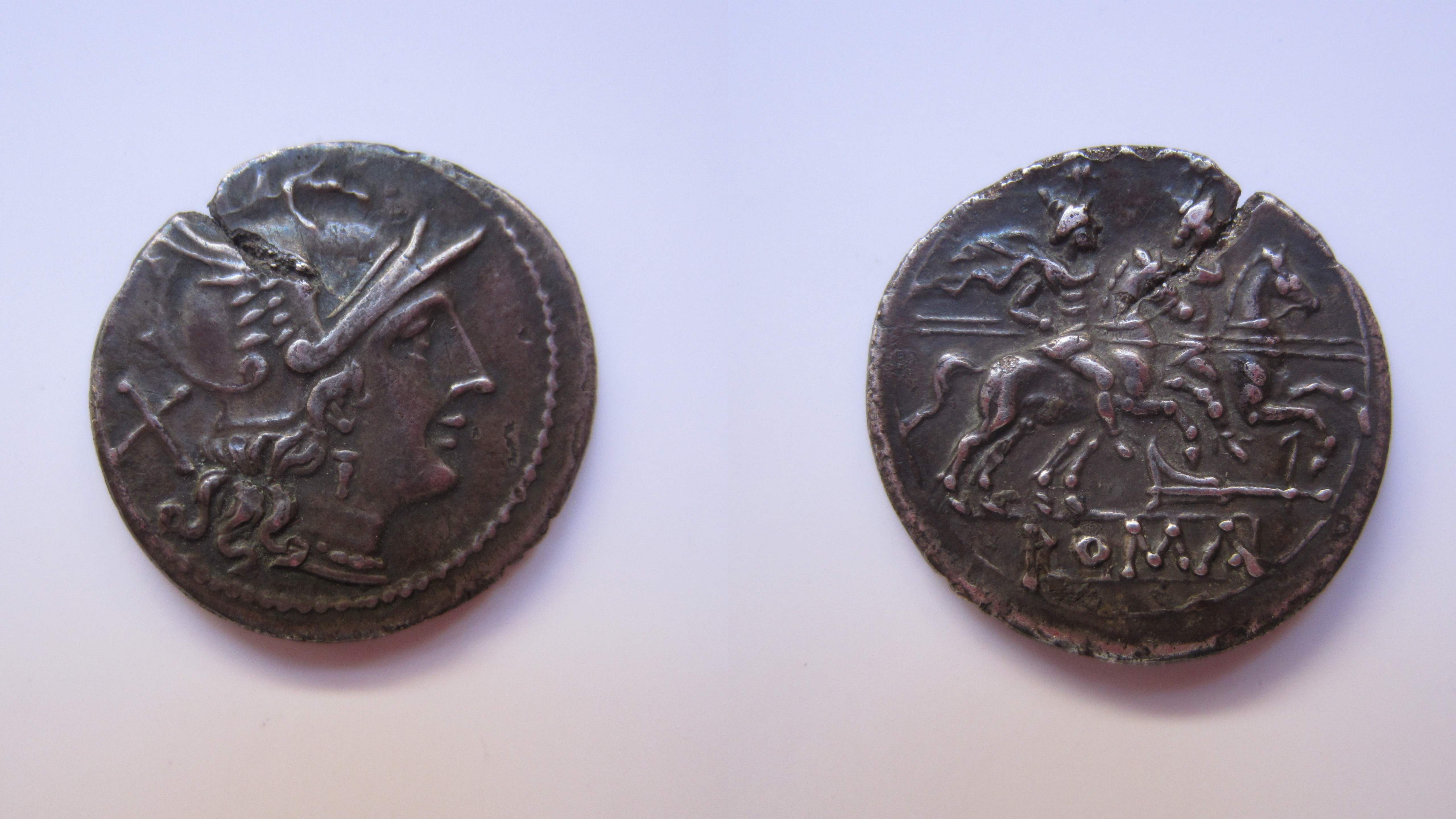 Denier republique romaine frappé entre 211 et 194 avant notre ére